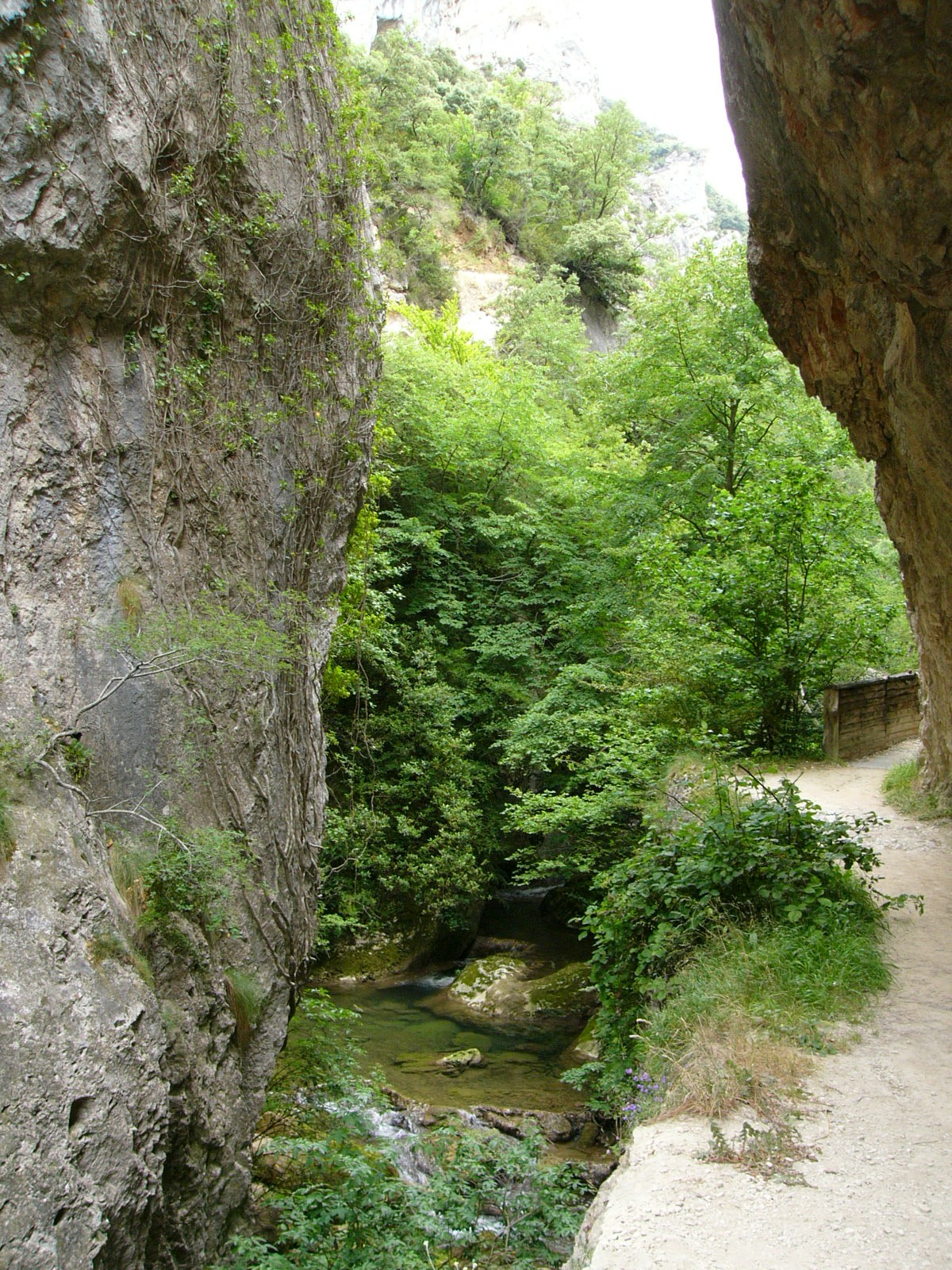 Valderejo Parke Naturala 6 This is a photography of a Site of Community Importance in Spain with the ID: ES2110024. Natura2000 entry, EEA entry